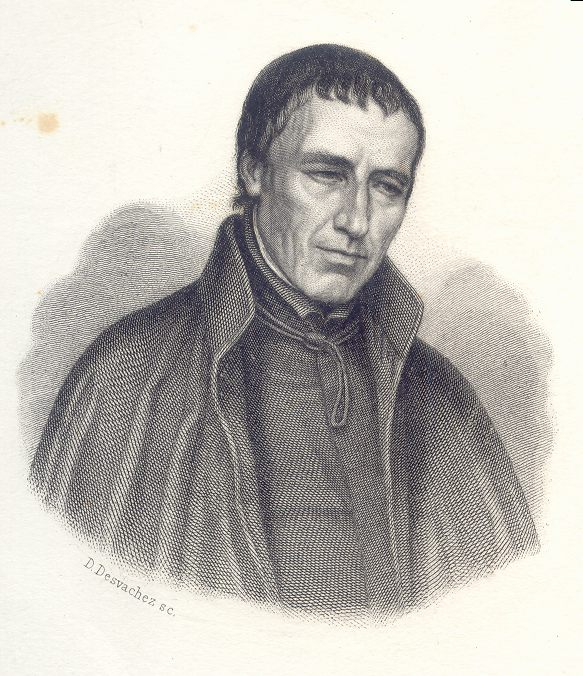 Gravure de Jean-Philippe Roothaan